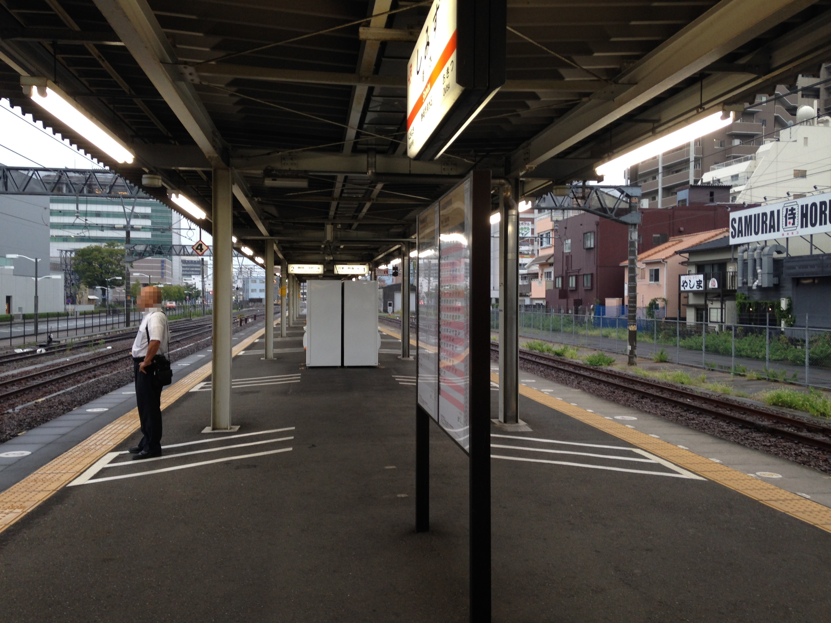 清水駅のホーム(奥は草薙方面)